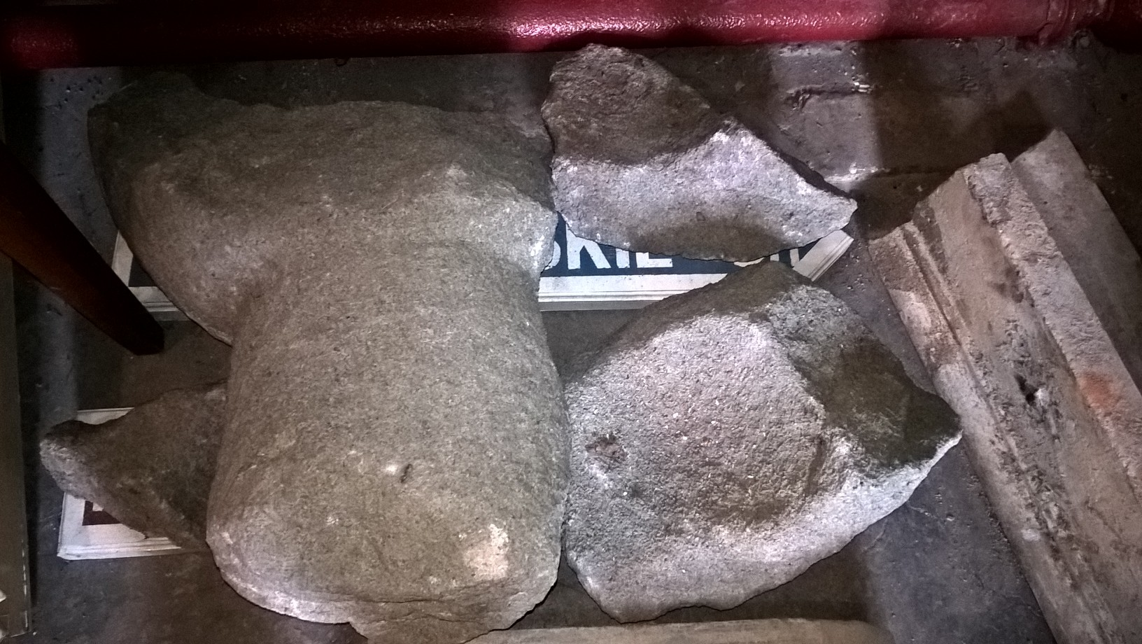 Fragmenty chrzcielnicy z kościoła św. Jakuba m. Długie gm. Szprotawa, przechowywane w Muzeum Ziemi Szprotawskiej.